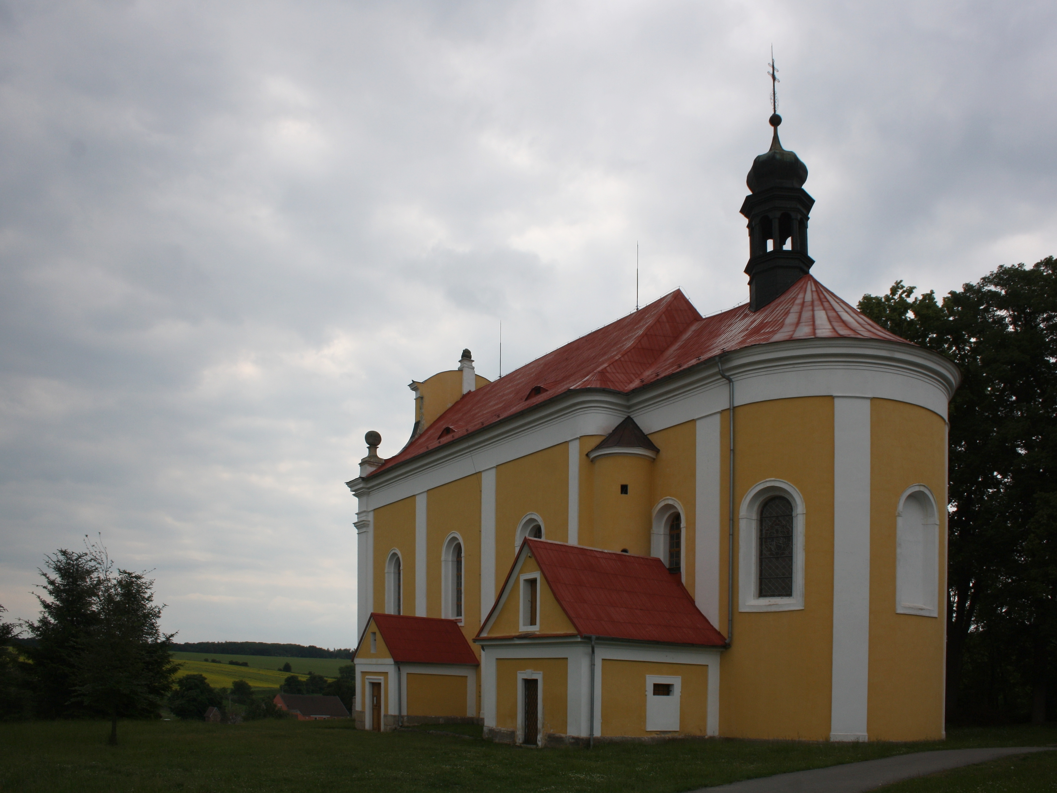 Kostel svatého Havla v Tuhani, okres Česká Lípa